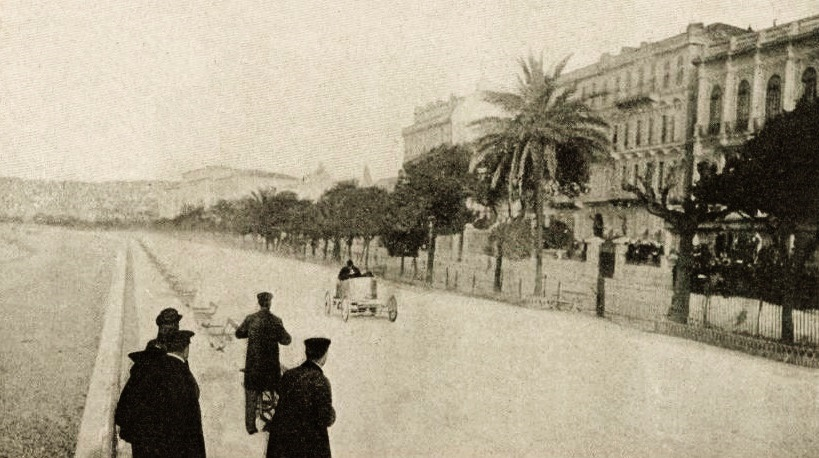 Léon Serpollet vainqueur de sa troisième Coupe Rotschild en avril 1903, au kilomètre lancé de la promenade des anglais de Nice (à 130 kmh) - La Vie au Grand Air du 18 avril 1903, p.247